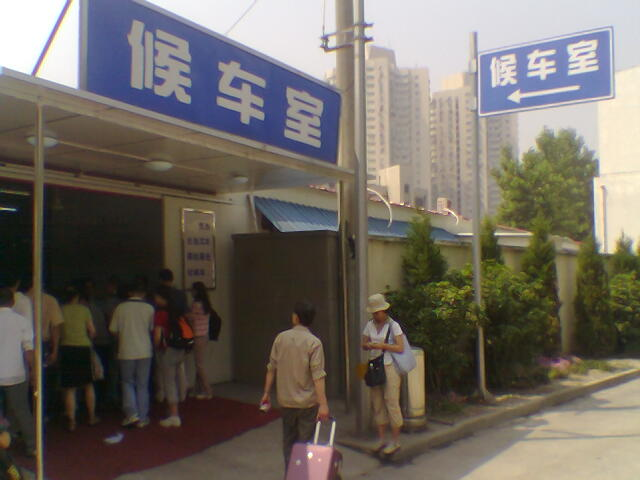 梅陇火车站候车室，摄于梅陇火车站（2005年6月2日）